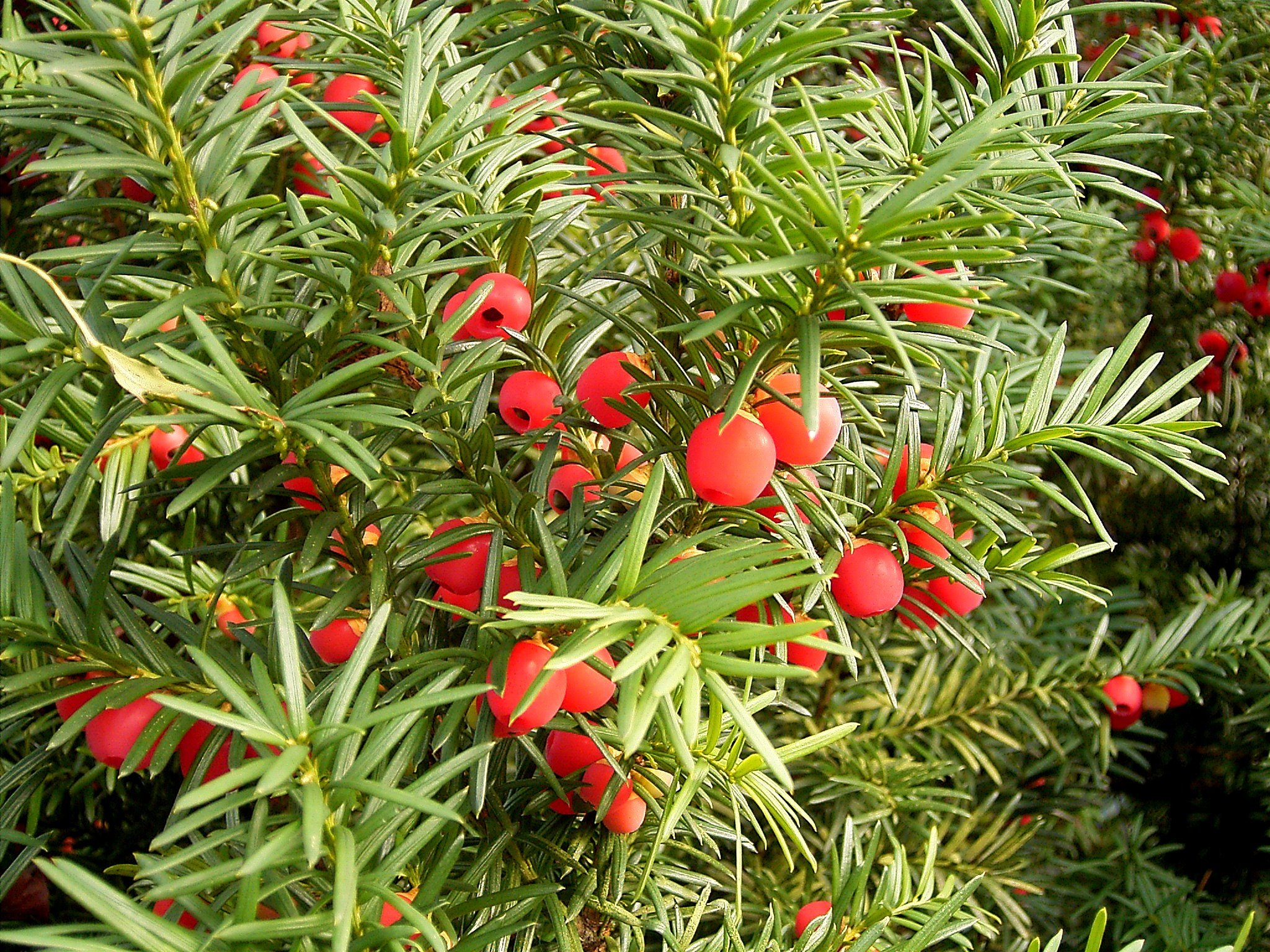 Taxus baccata